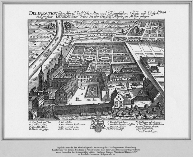 Abteiplan Seligenstadt Vogelschau Johann Stridbeck nach 1705